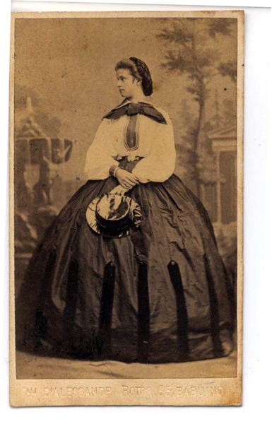 Matilde, contessa di Trani